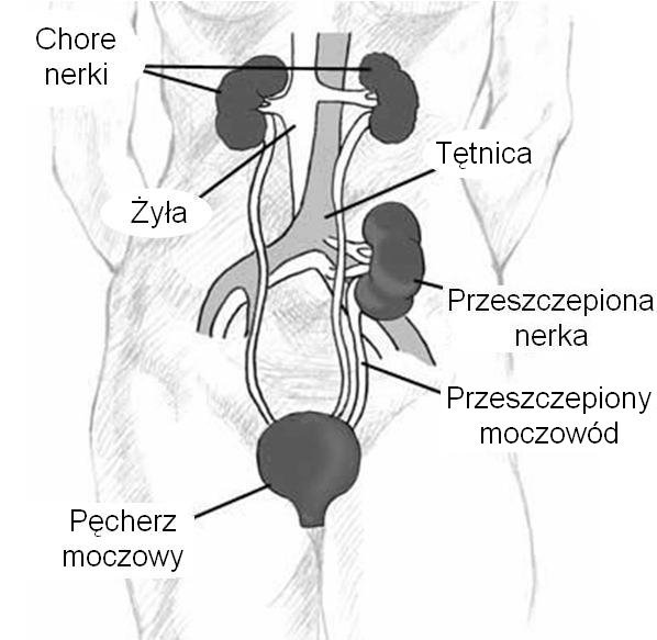 Umiejscowienie przeszczepionej nerki i moczowodu na tle zarysu człowieka.